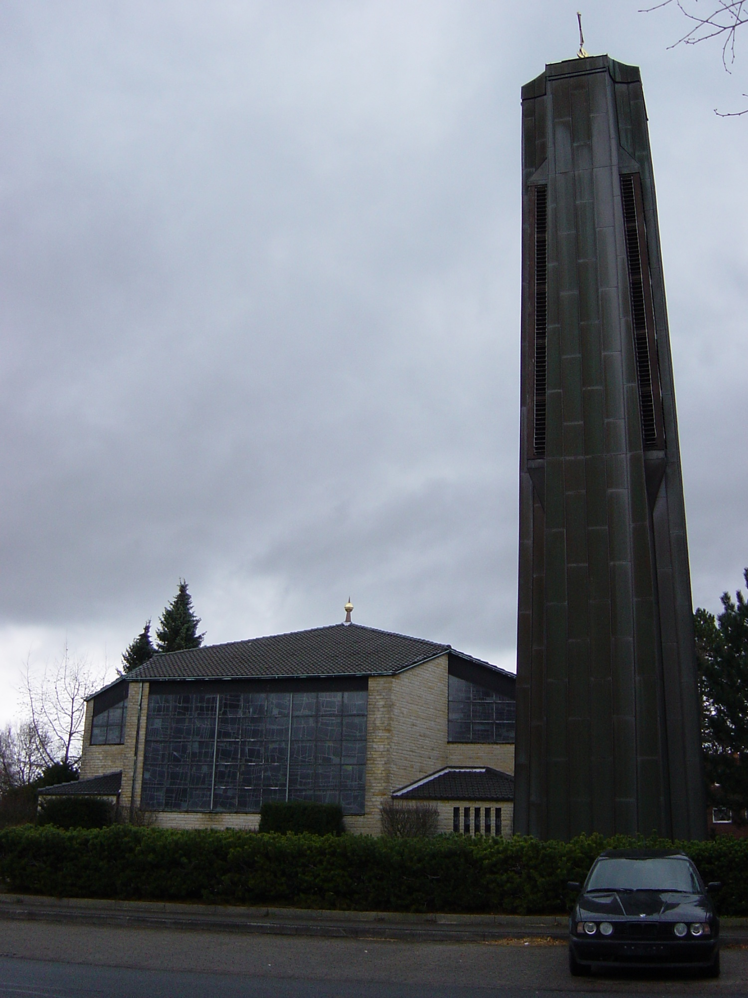 Katholische St. Ansgar Kirche, St.-Ansgar-Platz 6, 32425 Minden